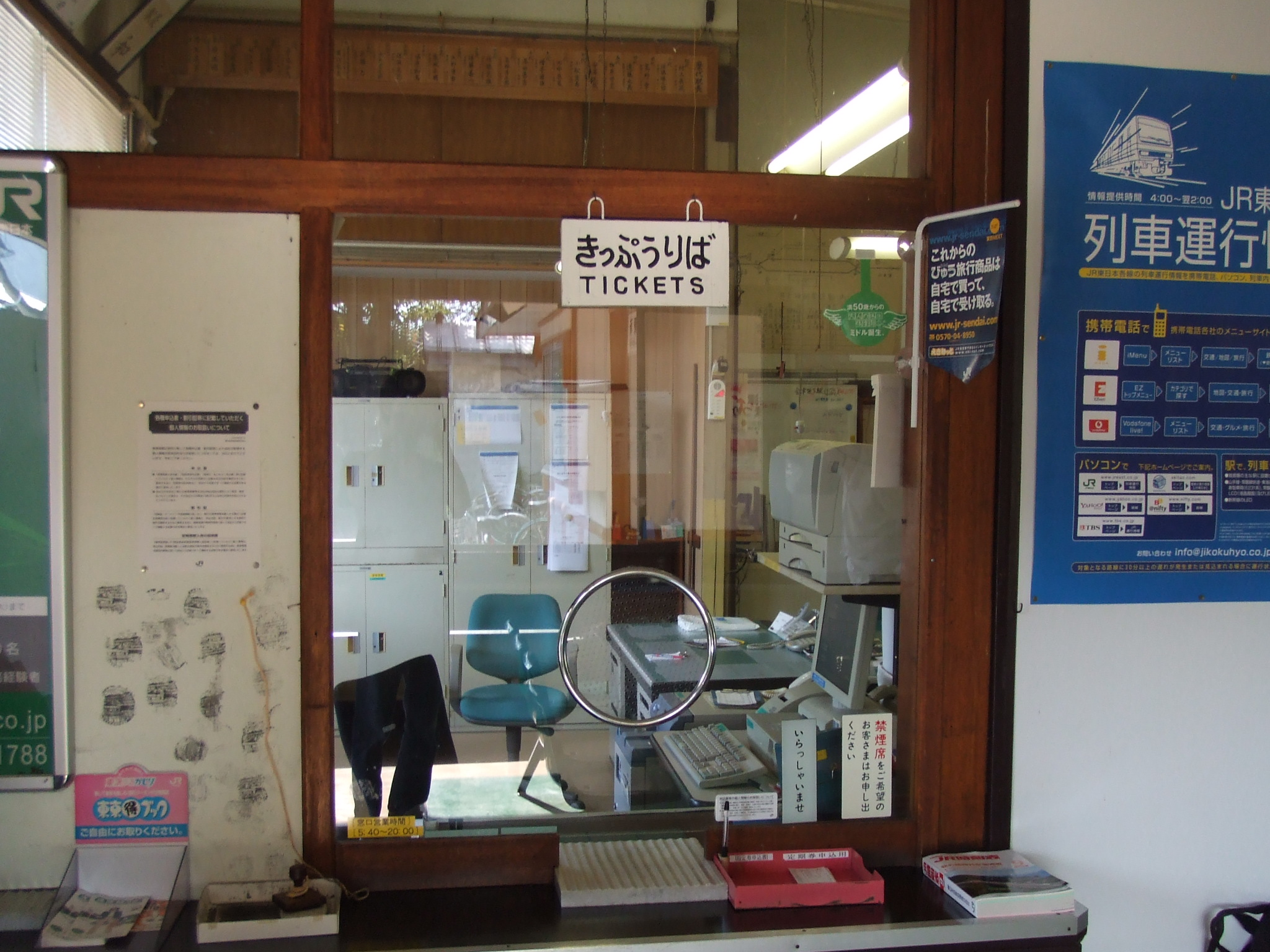 会津宮下駅 出札窓口